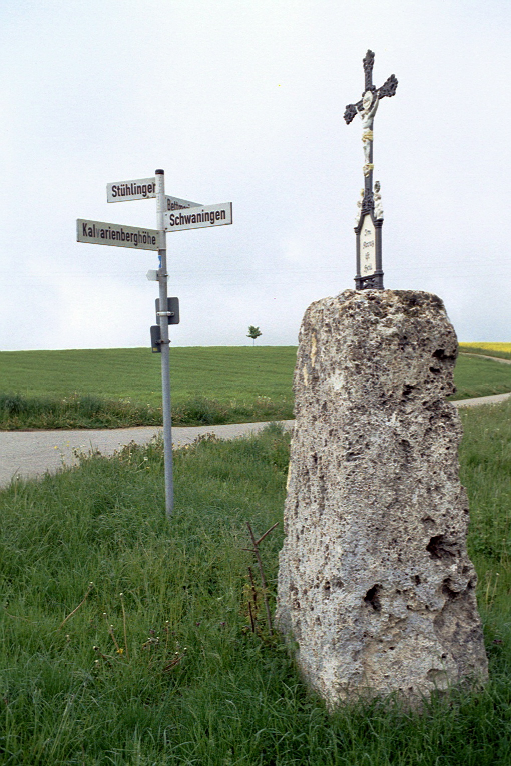 Landkreis Waldshut – Menhir bei Stühlingen als bearbeiteter Sockel eines Wegekreuzes (Kalvarienberg).